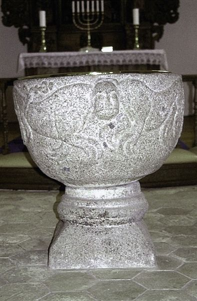 Sporup Kirke s døbefont Sporup Kirke ligger i Sporup Sogn, Favrskov Provsti (Århus Stift). Sognet ligger i Favrskov Kommune; indtil Kommunalreformen i 1970 lå det i Gjern Herred (Skanderborg Amt). Apsis, kor og skib er opført i romansk tid af granitkvadre